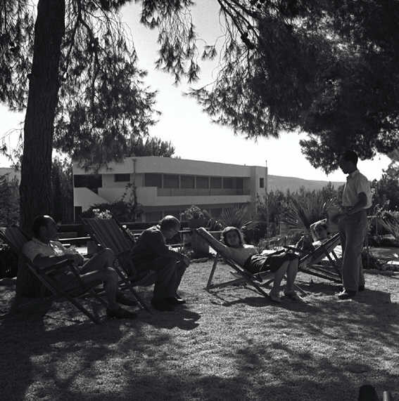 מוצא - בית ההבראה "ארזה" במוצא